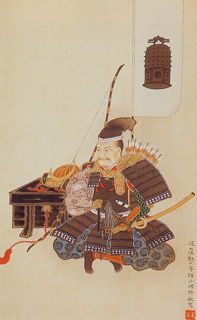 片倉景綱。Katakura Kagetsuna.